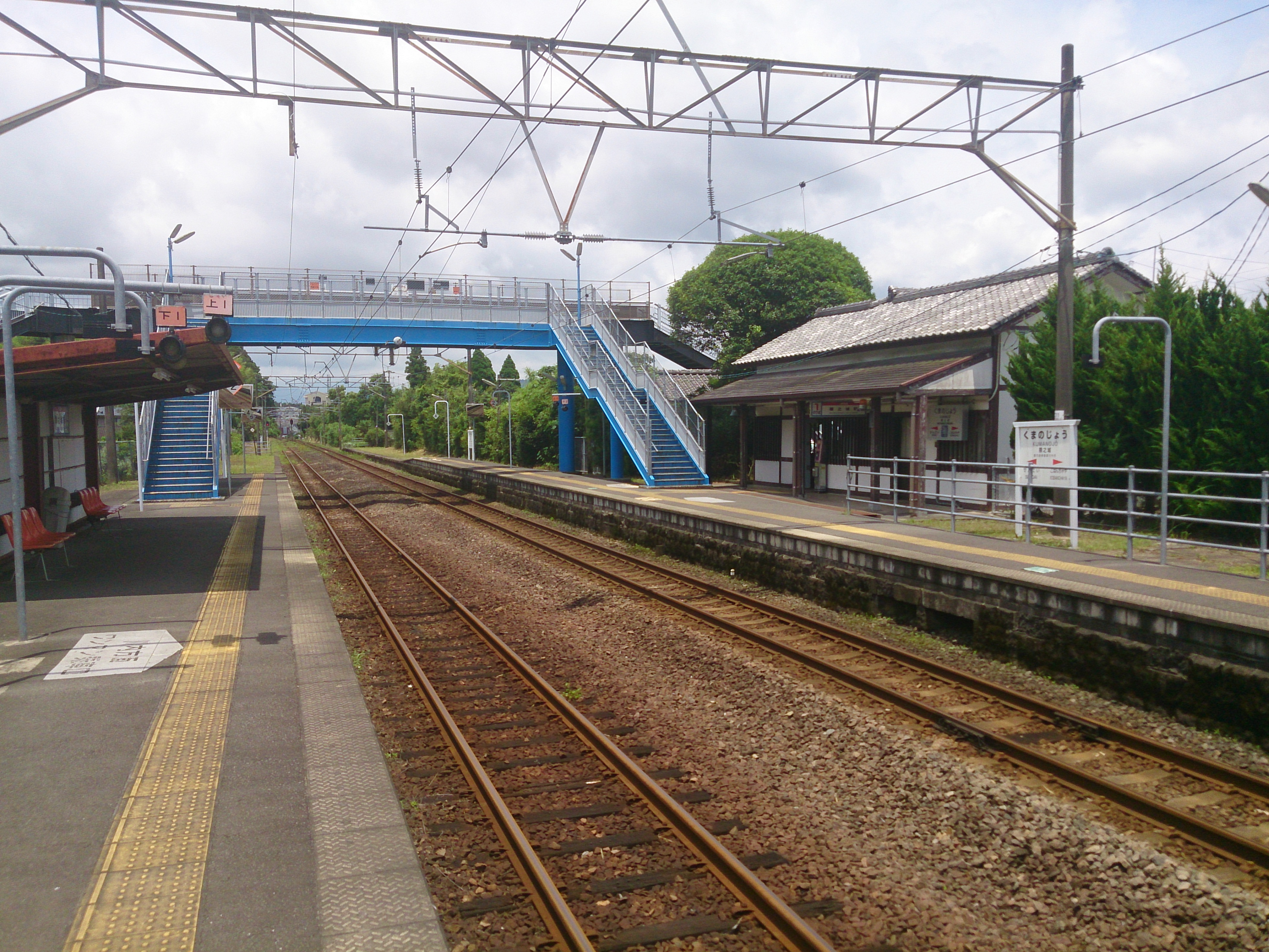 隈之城駅ホーム